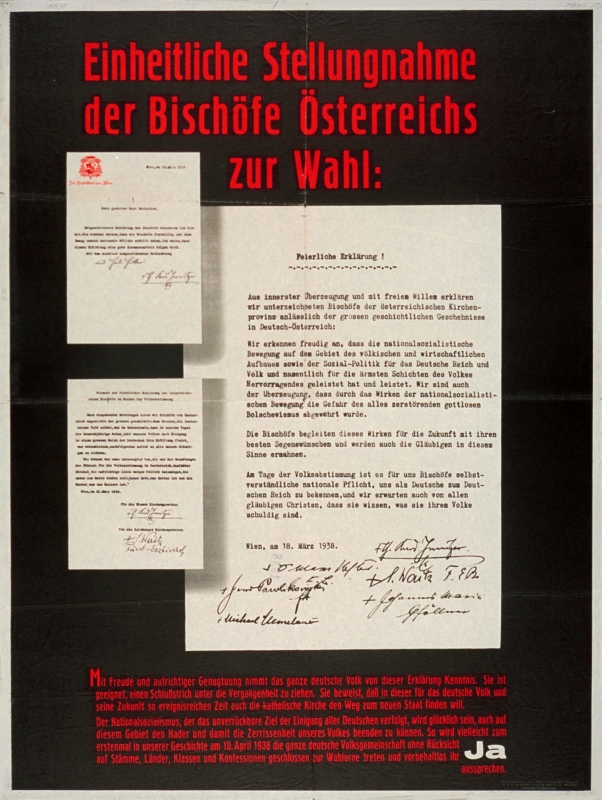 Werbung (Volksabstimmung) & Werbung (politisch), Anschluß, 1938.04.10, Österreich. Einheitliche Stellungnahme/ der Bischöfe Österreichs/ zur Wahl:/ (...)/ Beigeschlossene Erklärung der Bischöfe übersende ich hie-/ mit. (...)/ Vorwort zur feierlichen Erklärung der österreichi-/ schen Bischöfe in Sachen der Volksabstimmung/ (...)/ Feierliche Erklärung!/ Aus innerster Überzeugung und mit freiem Willem erklären/ wir unterzeichneten Bischöfe der österreichischen Kirchen-/ provinz anlässlich der grossen geschichtlichen Geschehnisse/ in Deutsch-Österreich:/ (...) (Plakattext)